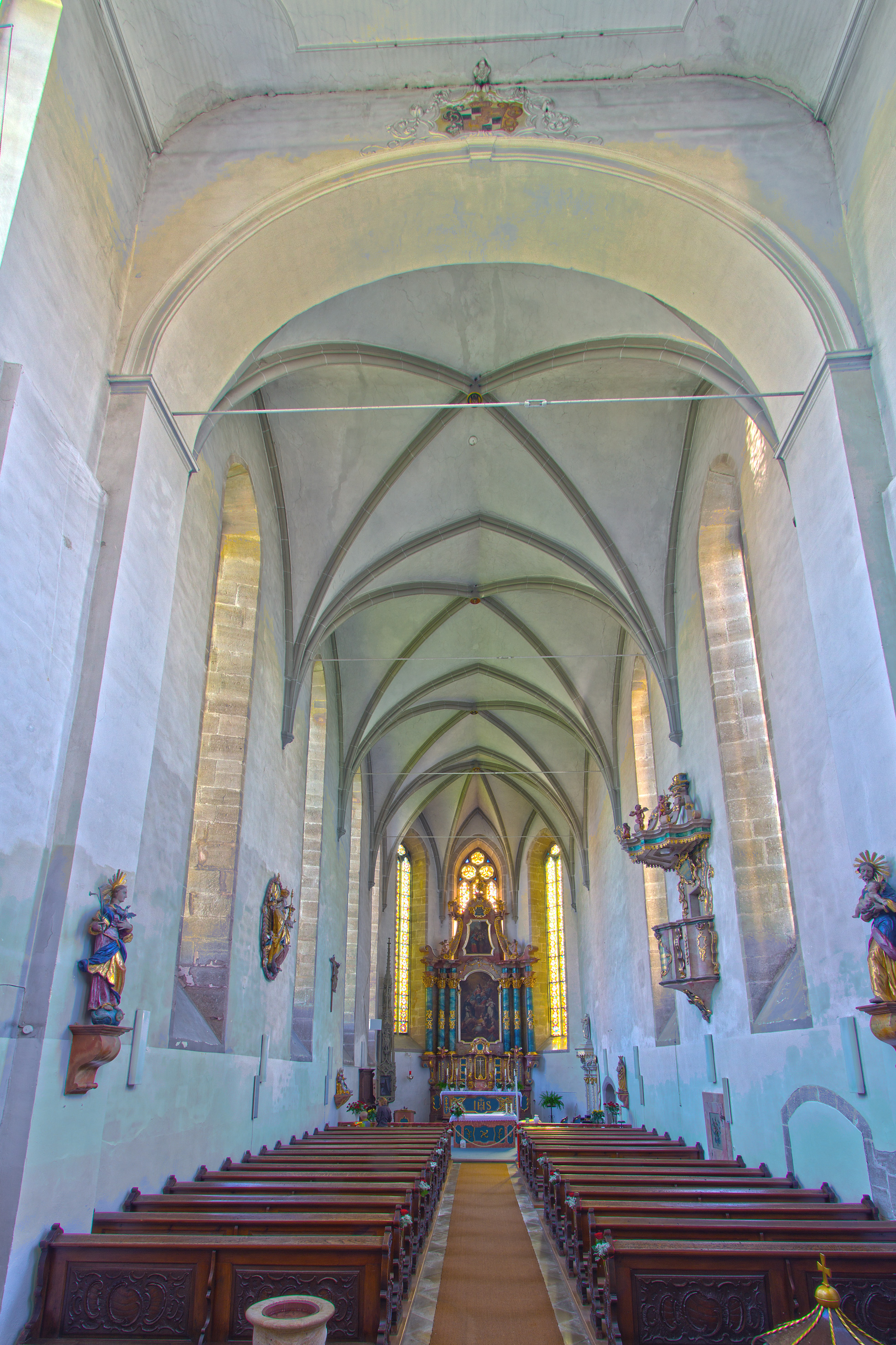 Schiff und Chor des ehemaligen Klosters Stetten im Gnadental. Das Kloster befindet sich in Stetten, einem Teilort von Hechingen im Zollernalbkreis (Baden-Württemberg). Gegründet wurde es als Augustinerinnenkloster, bereits im Jahr 1278 wurde es aber den Dominikanerinnen unterstellt. Es war im Mittelalter die Erbgrablege der Grafen von Zollern.